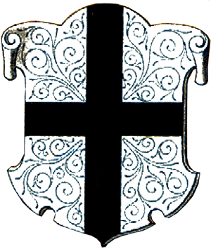 Титульна сторінка «Балтійського гербовника». Герб Старої Лівонії (XIV—XV століття)